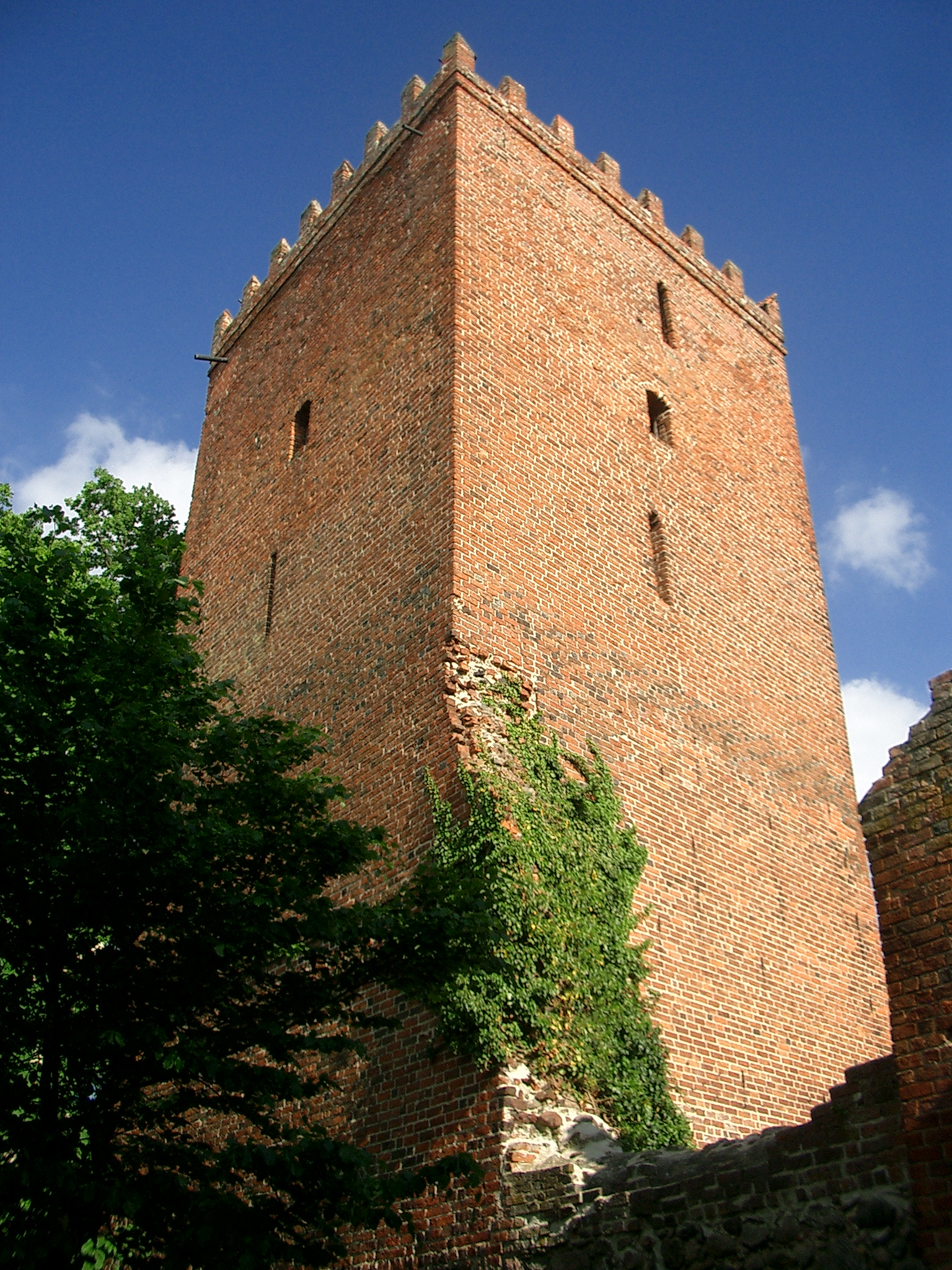 Bergfried der Apenburg in Sachsen-Anhalt